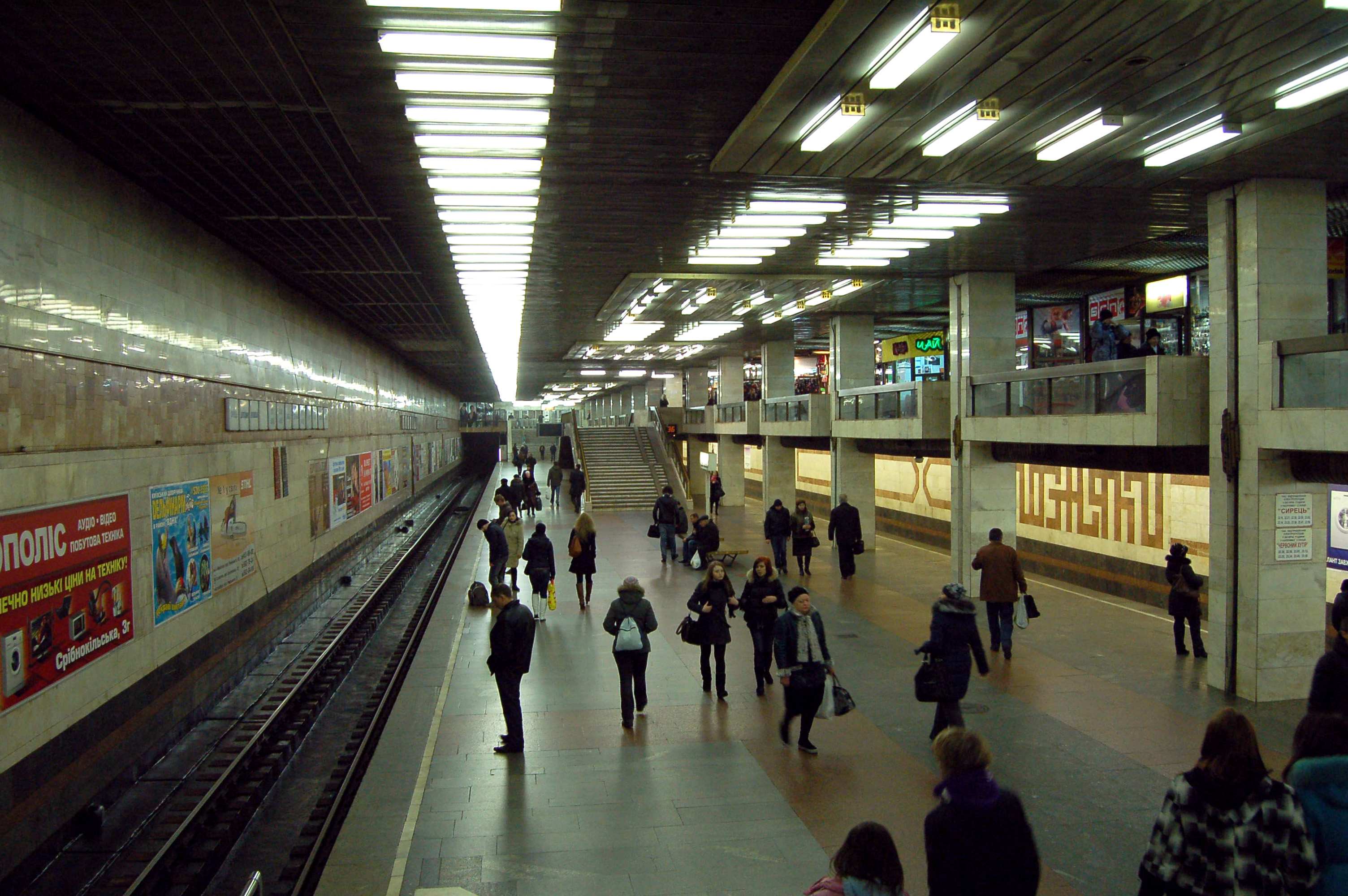 Cтанция метро «Позняки», пассажирская платформа